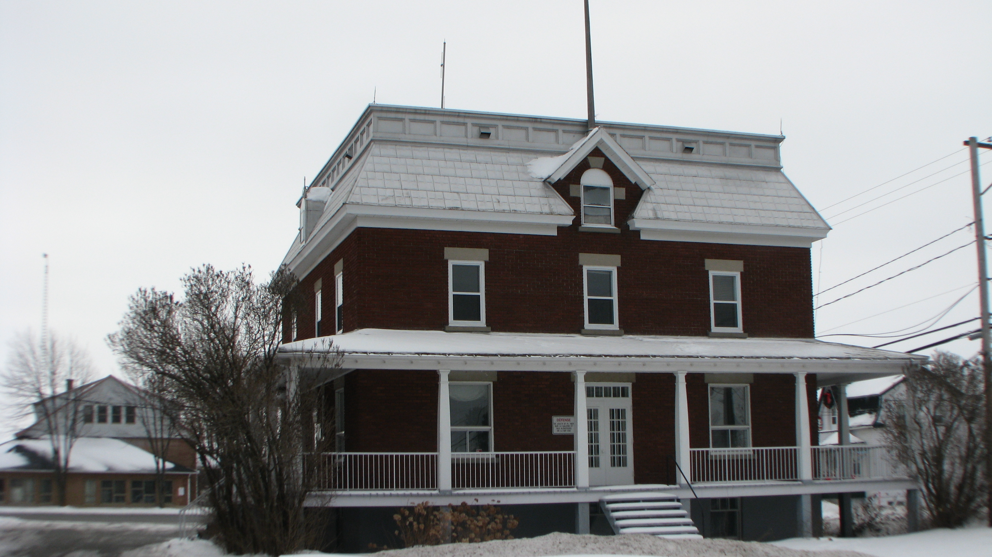 Presbytère de l'église Sainte-Victoire de Sainte-Victoire-de-Sorel